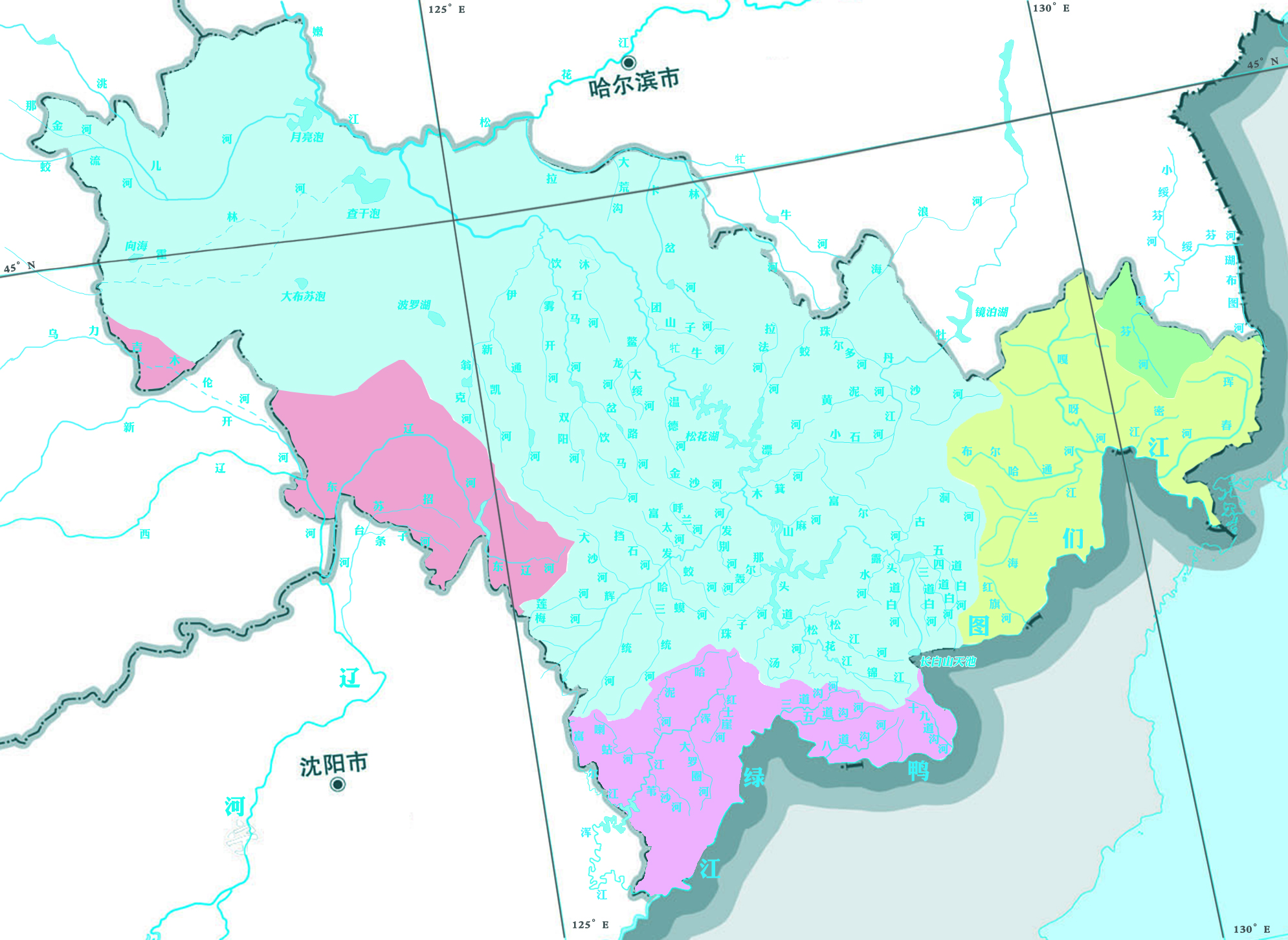 中国吉林省河流水系图，水系资料参考自《中国河湖大典·黑龙江 辽河卷》，地图源自国家测绘地理信息局标准地图数据。